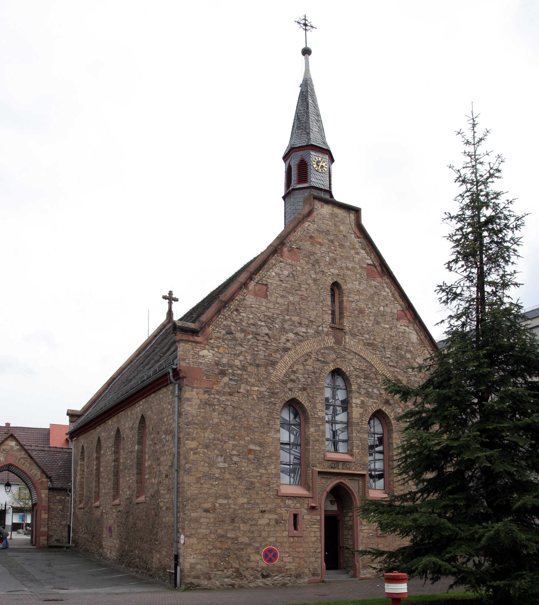 Die unter Denkmalschutz stehende Hospitalkirche der Stadt Bensheim